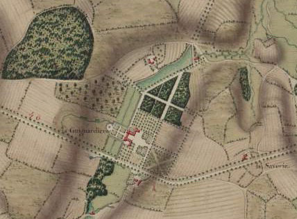 Schloss La Guignardière auf einem Plan des sogenannten Rudiane-Atlasses